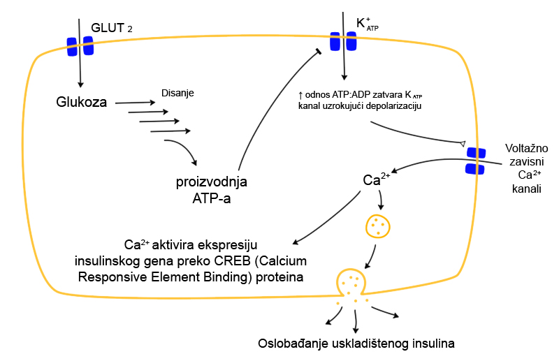 Šematski prikaz oslobađanja insulina.